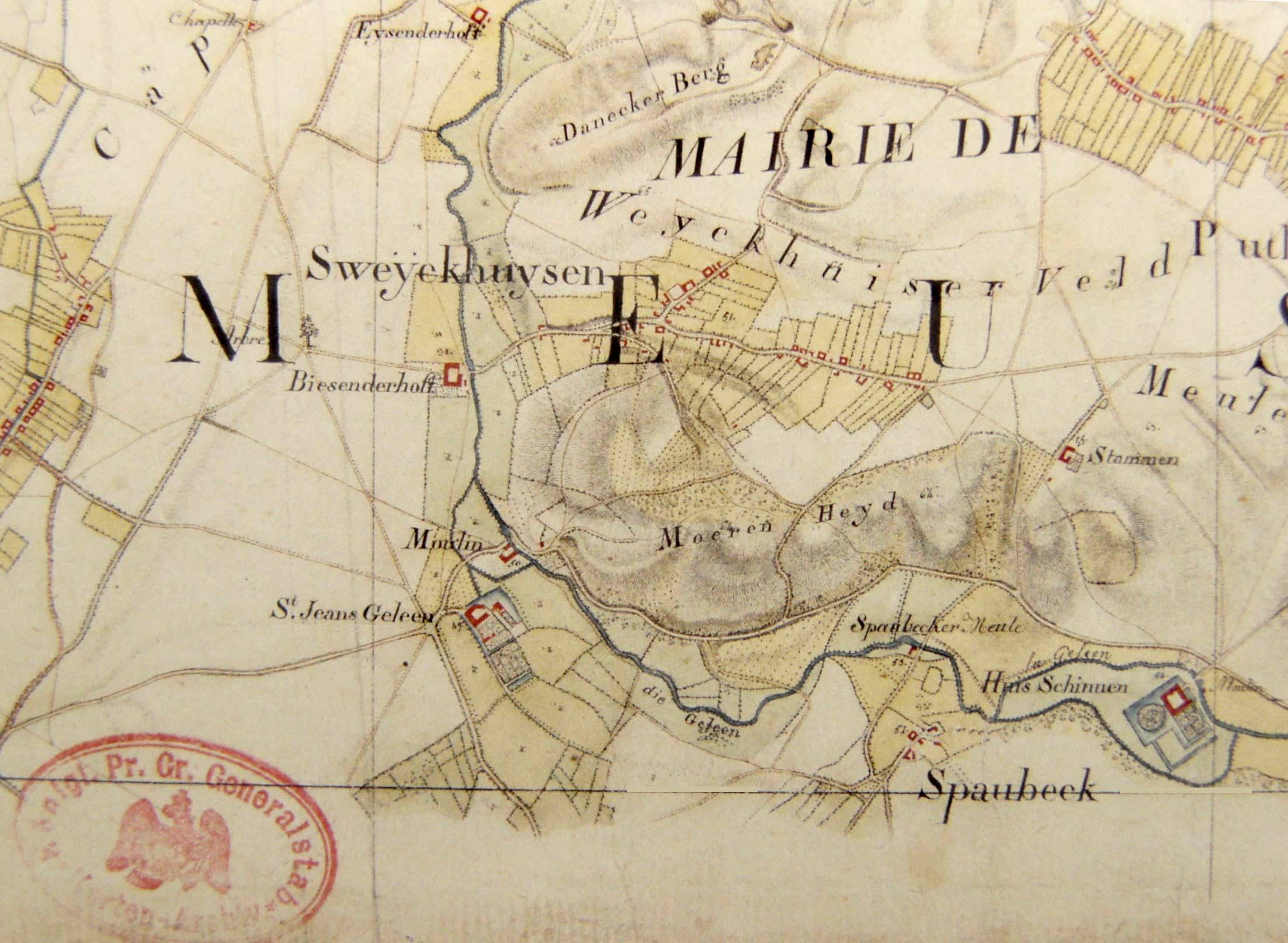 Tranchotkaart van Sweikhuizen (L) uit 1802. Digitale bewerking Stevenhagen. Origineel Staatsbibliothek Preussischer Kulthurbesitz, Berlin. Vrij te gebruiken.